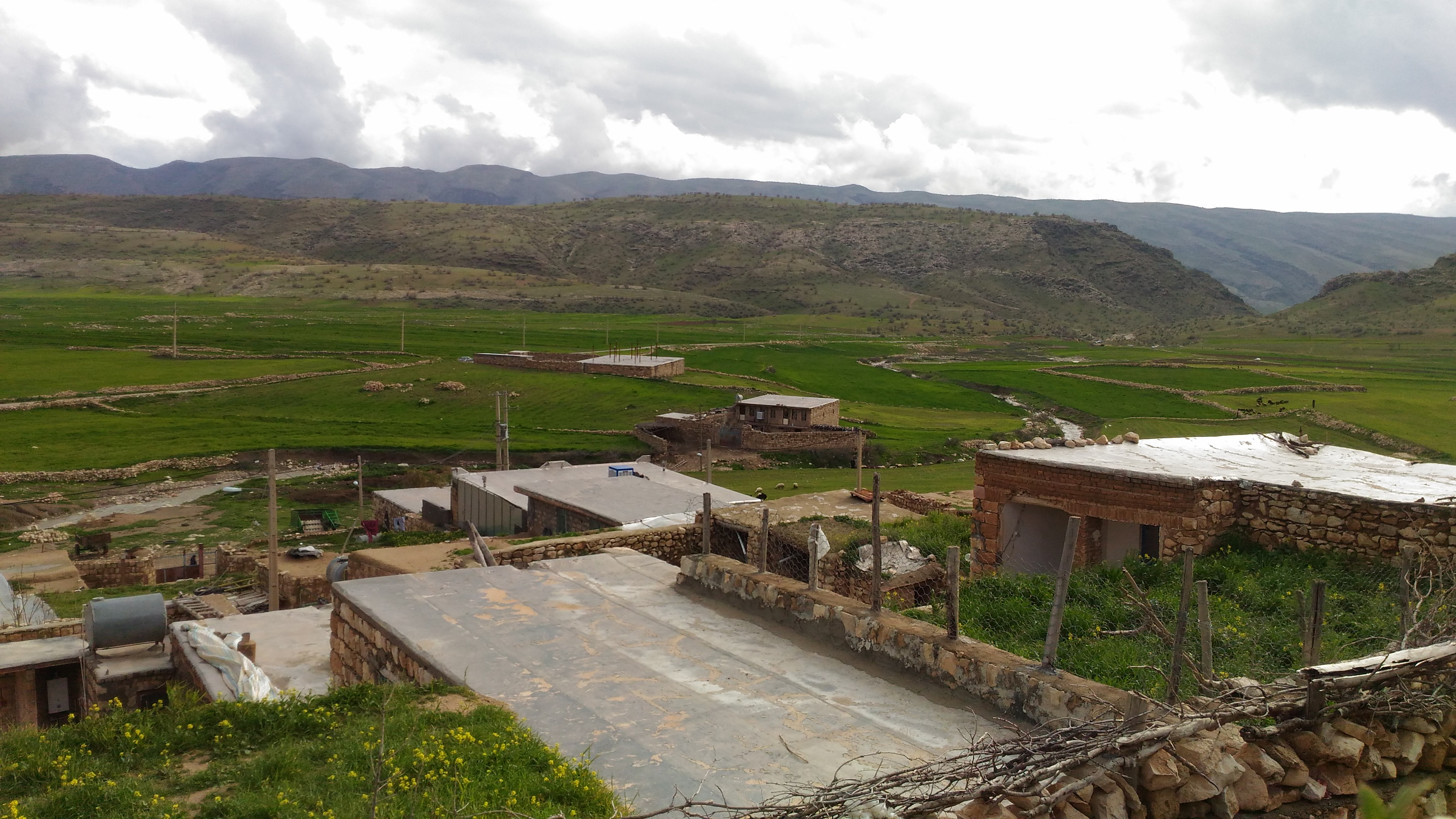 روستای قبله